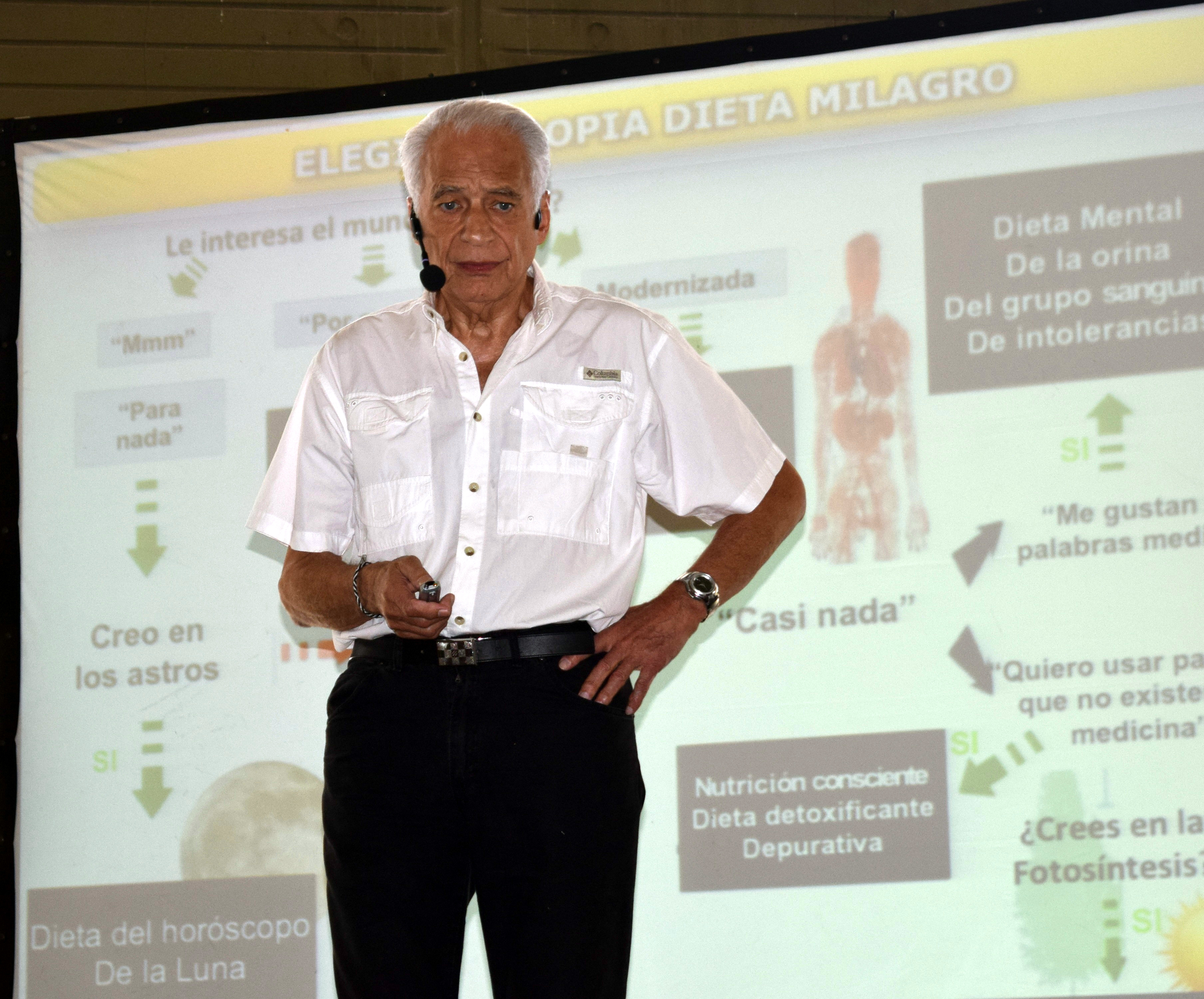 El doctor Alberto Cormillot en el plenario de ALCO (Anónimos Luchadores Contra la Obesidad) en noviembre de 2014 en la ciudad de Buenos Aires.